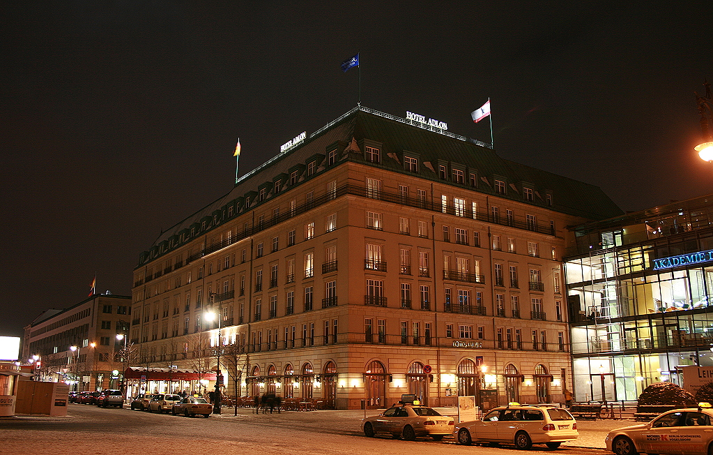 Hotel Adlon bei Nacht